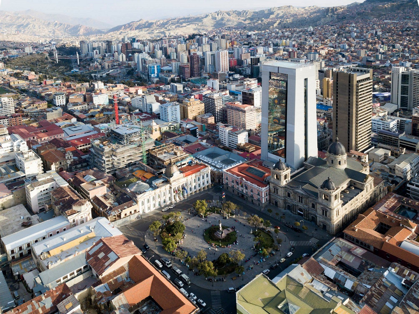 Edificios de la ciudad de La Paz